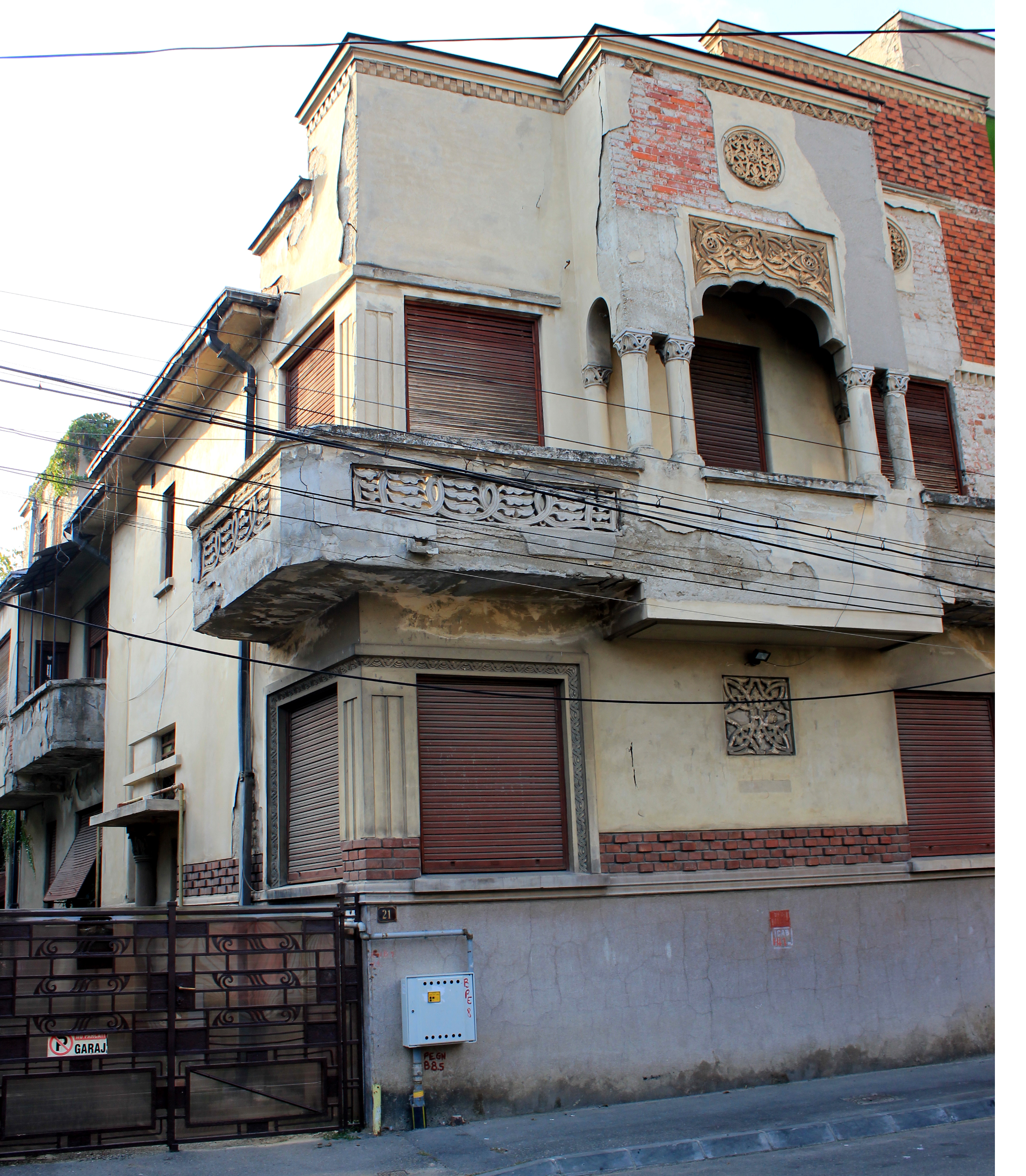 Casă Kiritescu Constantin 21